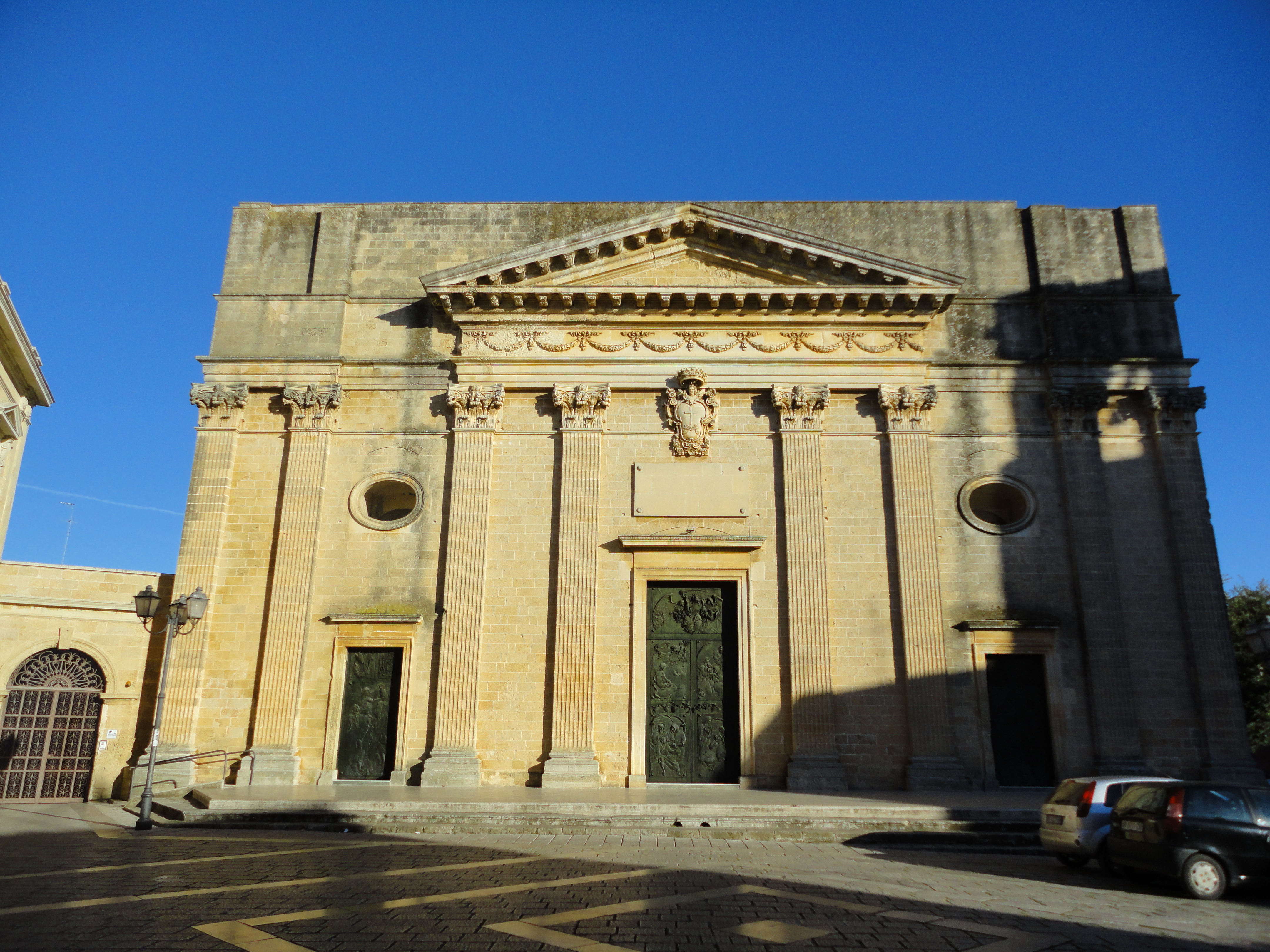 Chiesa di Alessano Madre, Lecce